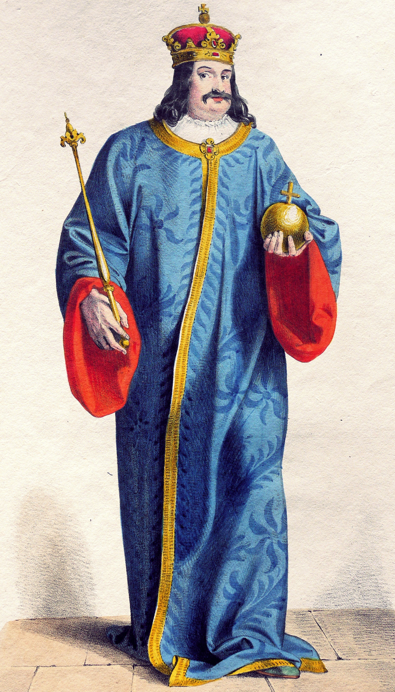 Wladislaw I. (1424-1444), König von Ungarn, Polen etc.. Lithographie von Josef Kriehuber nach einer Zeichnung von Moritz von Schwind aus Ungerns Erste Heerführer Herzoge und Koenige In einer Reihe von Bildnissen von Bela bis auf Seine Majestät Franz I. Kaiser Von Österreich König Von Ungern &c., &c. Wien : Lithographisches Institut ;ca. 1828